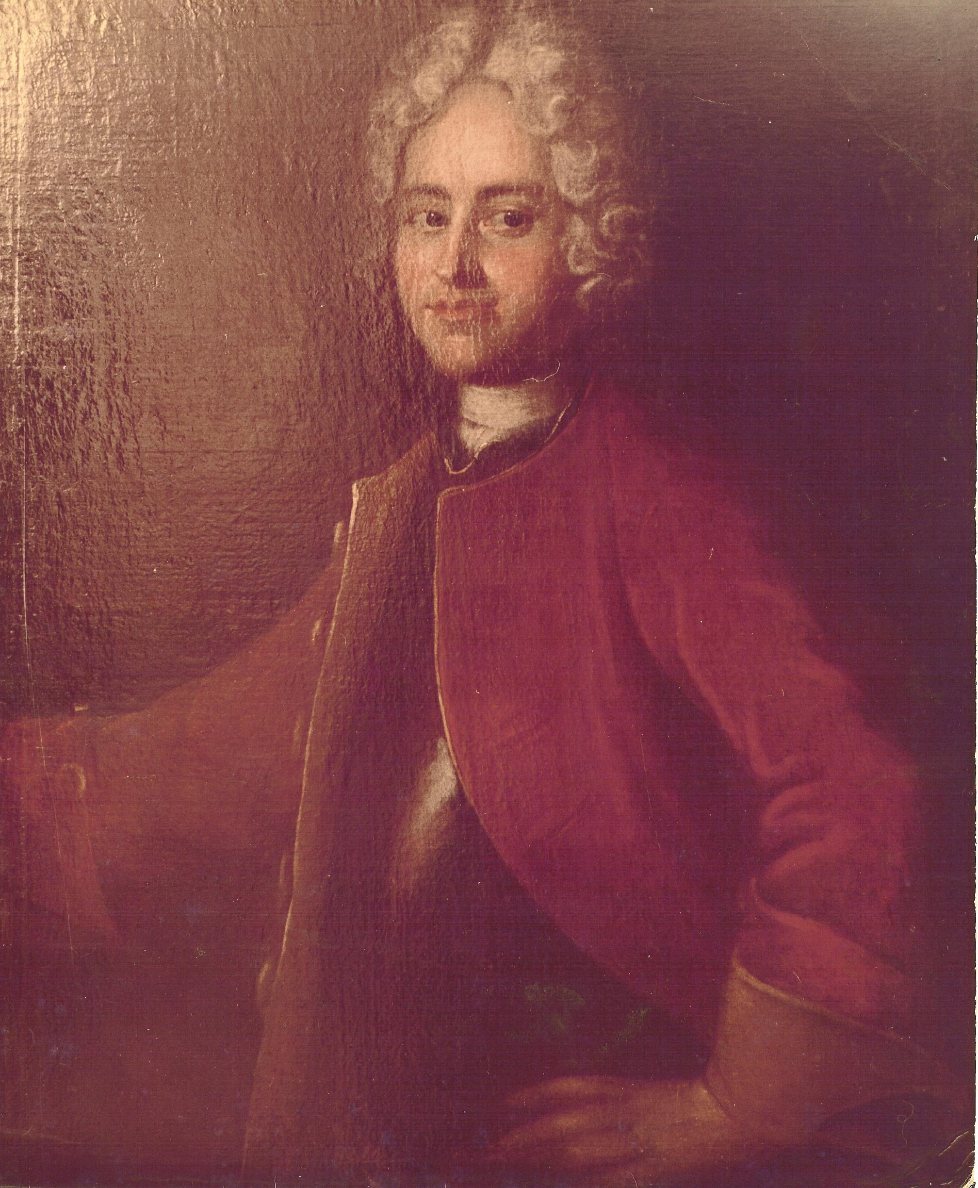 Joachim Daniel von Jauch (1688-1754) (Joachim_Daniel_von_Jauch.jpg) Fotograf/Zeichner: Maler unbekannt, Photo Marian Russocki Datum der Aufnahme: ca. 1985 Andere Versionen: keine --Fifat 02:35, 13. Apr 2005 (CEST)